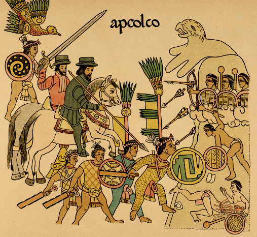 Conquista del señorio caxcán de Apulco por los españoles y Tlaxcaltecas.